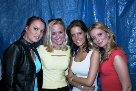 (L-R) Naomi Louwerens, Mandy Gruijters, Denise Koopal en Jenske Moermond van meidengroep Wow! voor een optreden in Pijnacker op 6 Mei 2000.